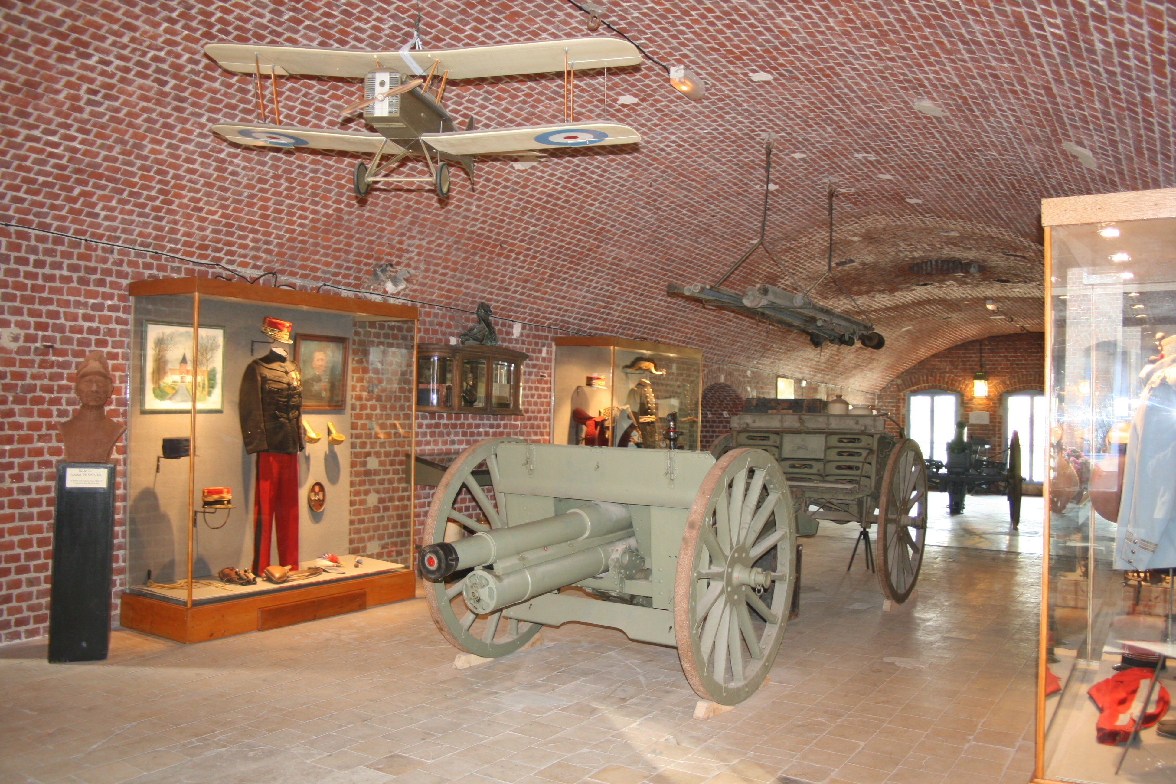 Musée du Fort de Seclin